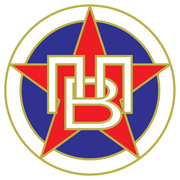 Эмблема ЦДКА (ПФК ЦСКА Москва) Эмблема футбольного клуба